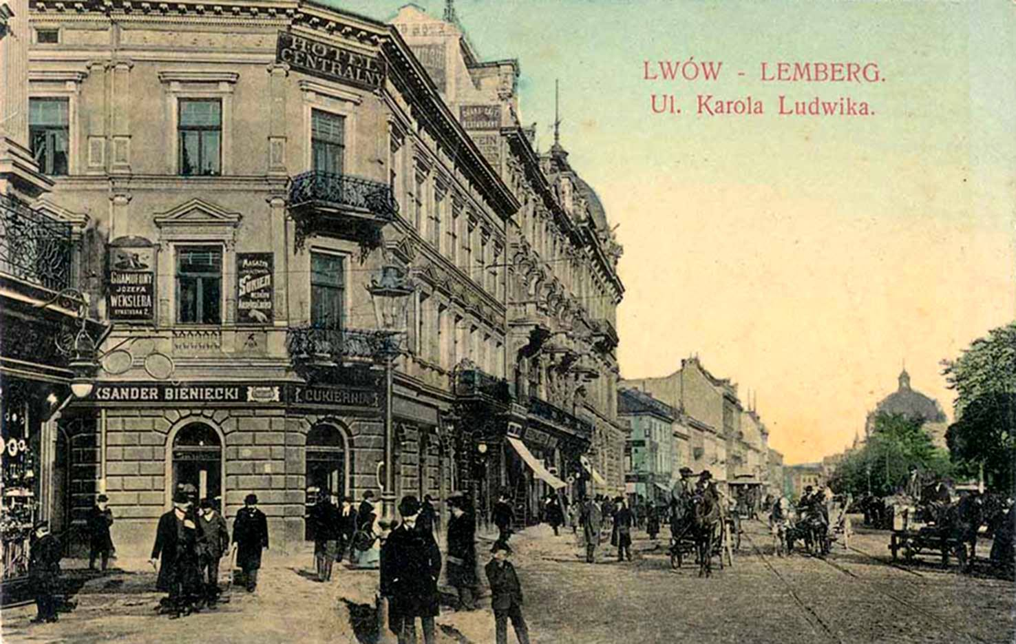 пр.Свободи